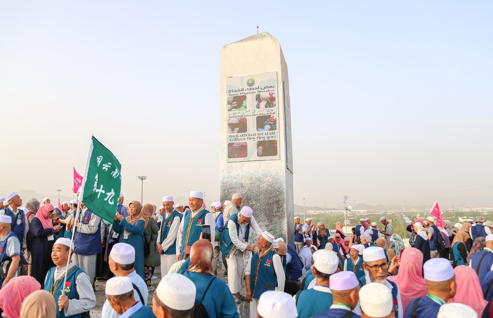 معلم تاريخ يقع في قمة جبل الرحمة بمشعر عرفات